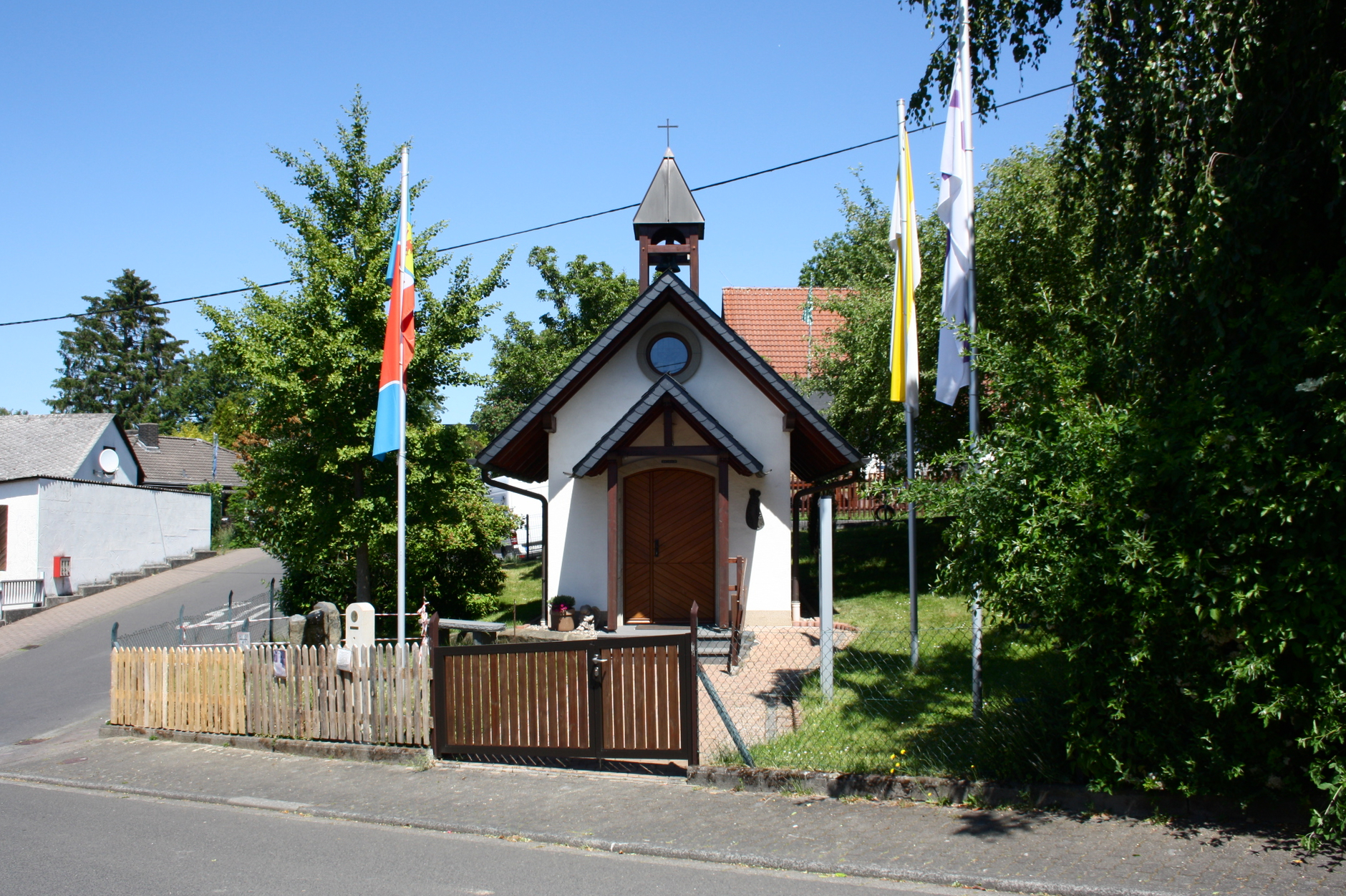 Marienkapelle, Caan, Westerwald, Rheinland-Pfalz, Deutschland